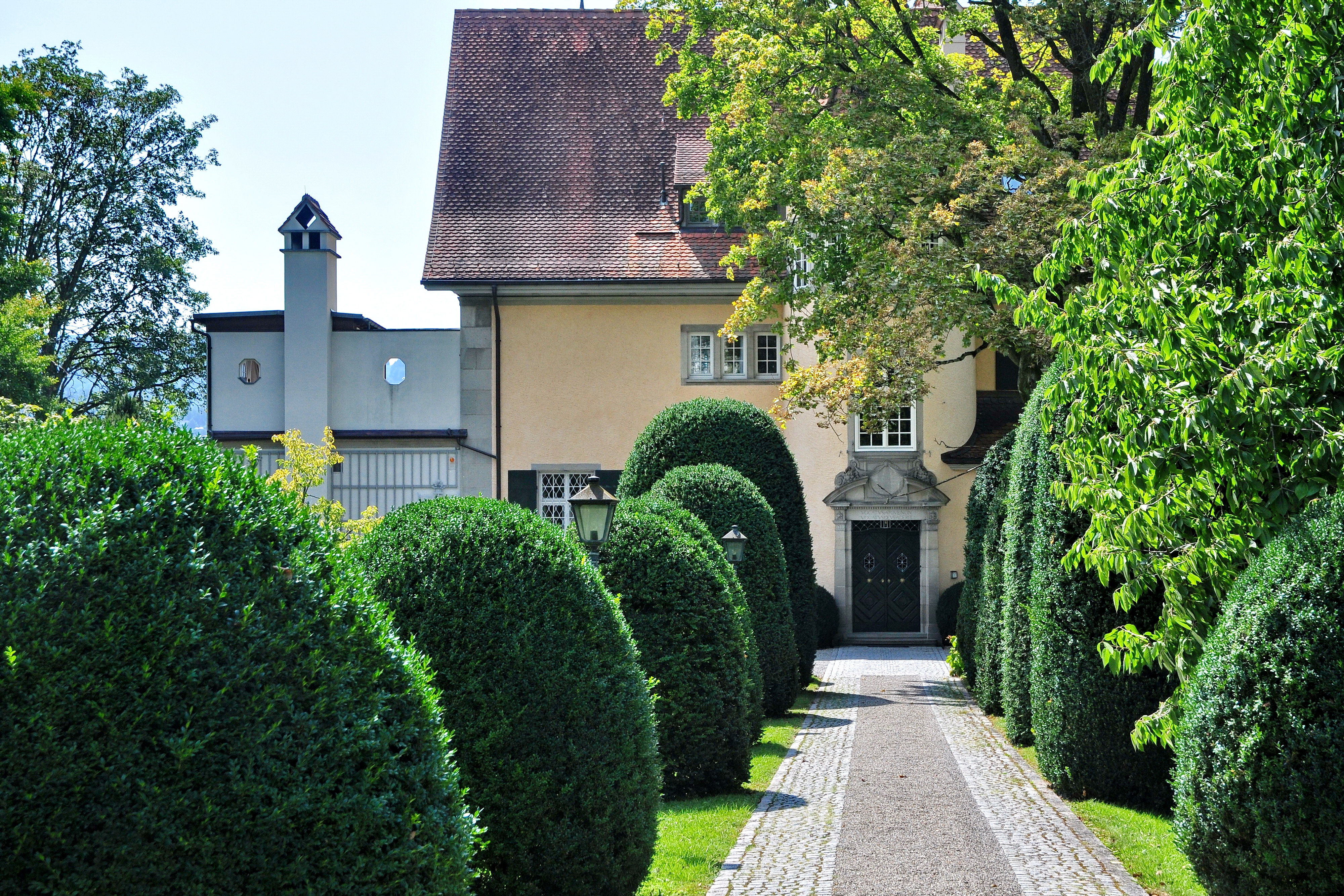 Wohnhaus von C. G. Jung, Seestrasse 228 in Küsnacht (Switzerland)